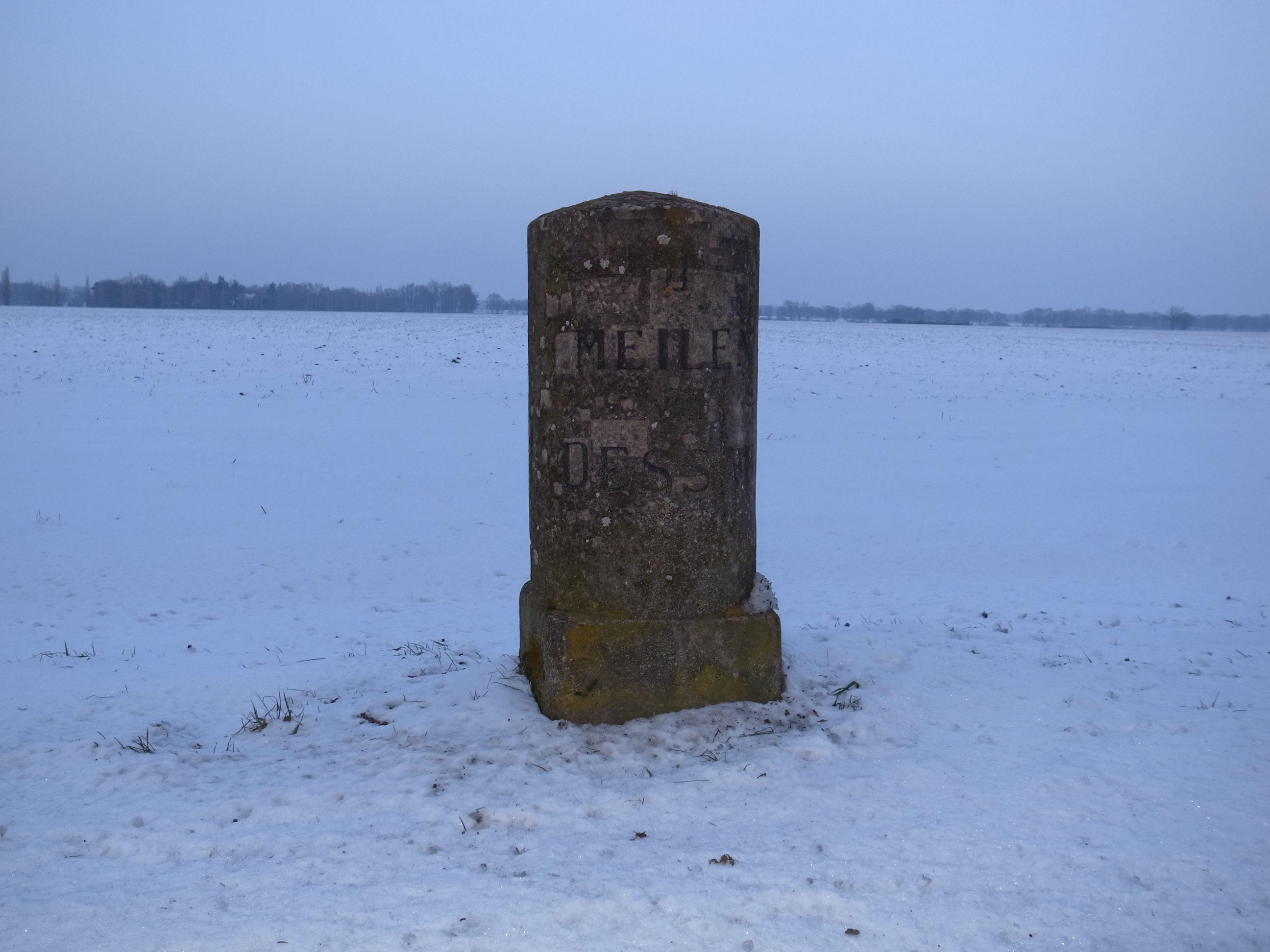 Wörlitz,Meilenstein (II Meilen von Dessau)